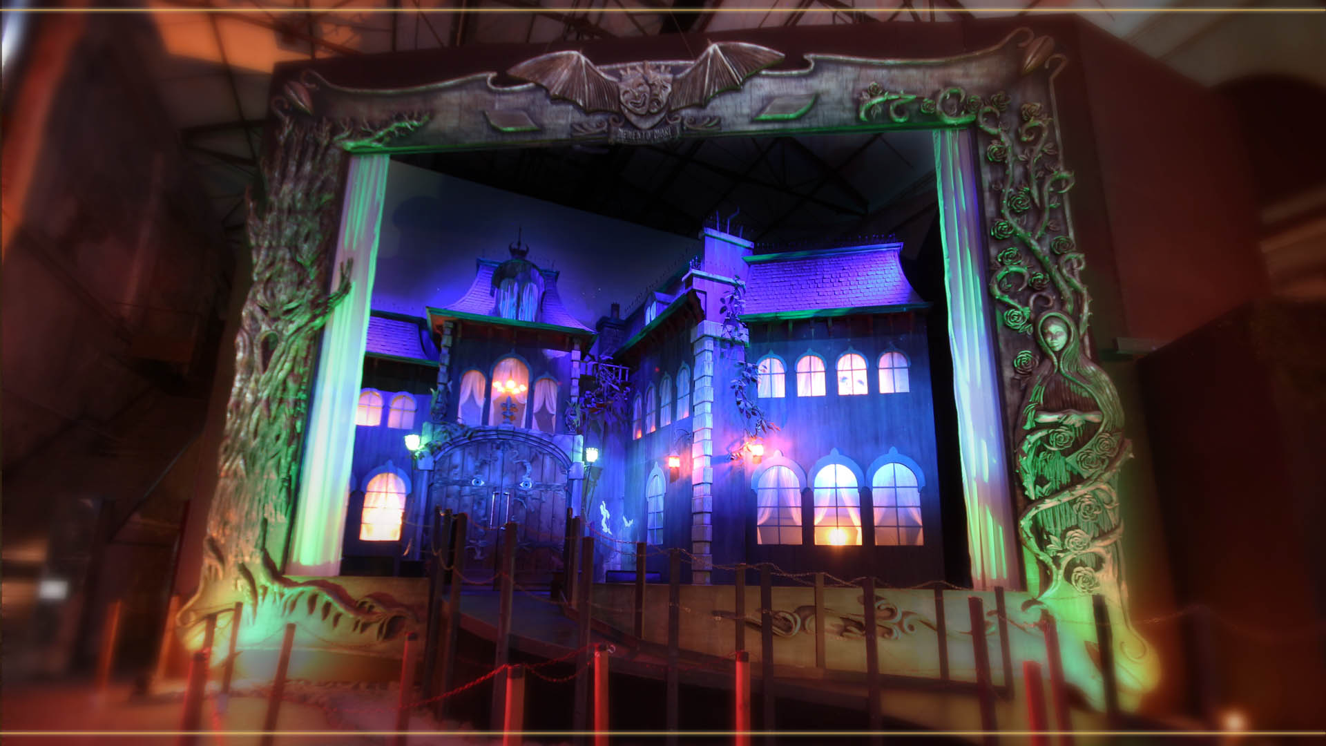 Bilderrahmen, Eingang zur Traumwelt von Im Bann der Finsternis